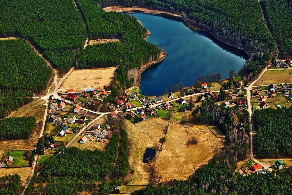 Juszki z lotu ptaka.